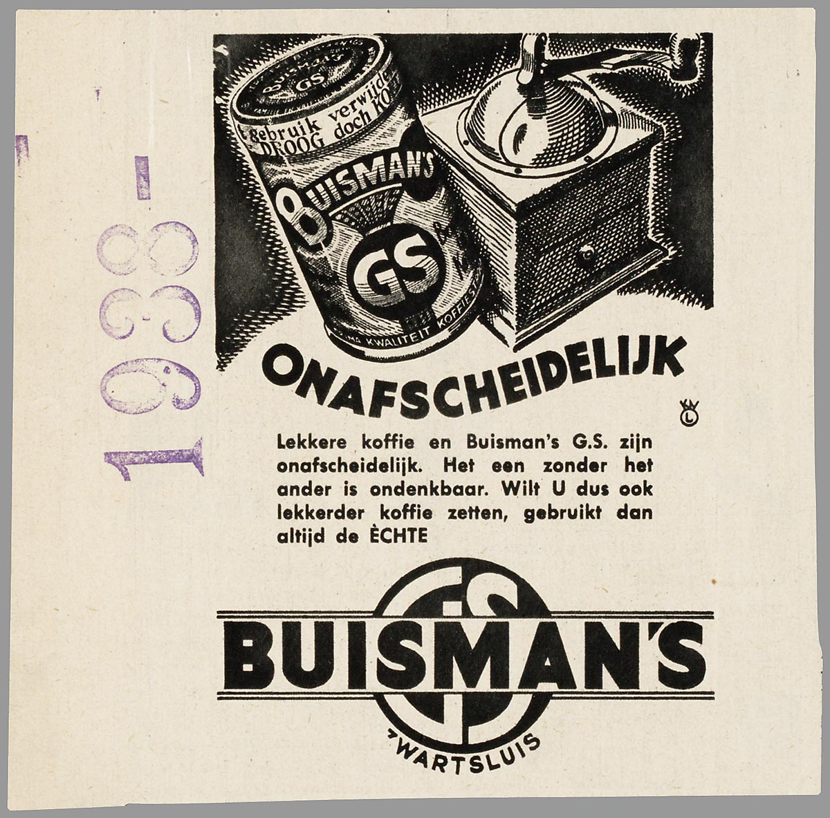 Advertentie: Buisman's GS. Opdrachtgever/adverteerder: Koninklijke Fabriek van Gebrande Suiker R. Buisman (Zwartsluis).